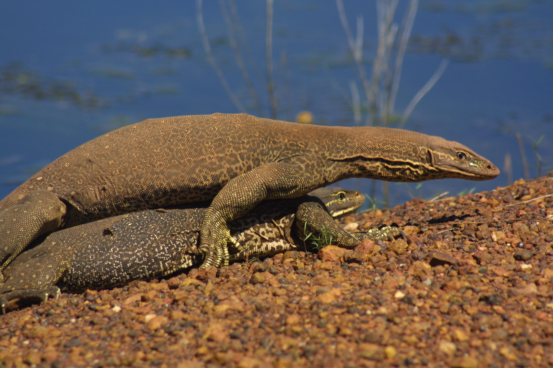 Mating Goannas